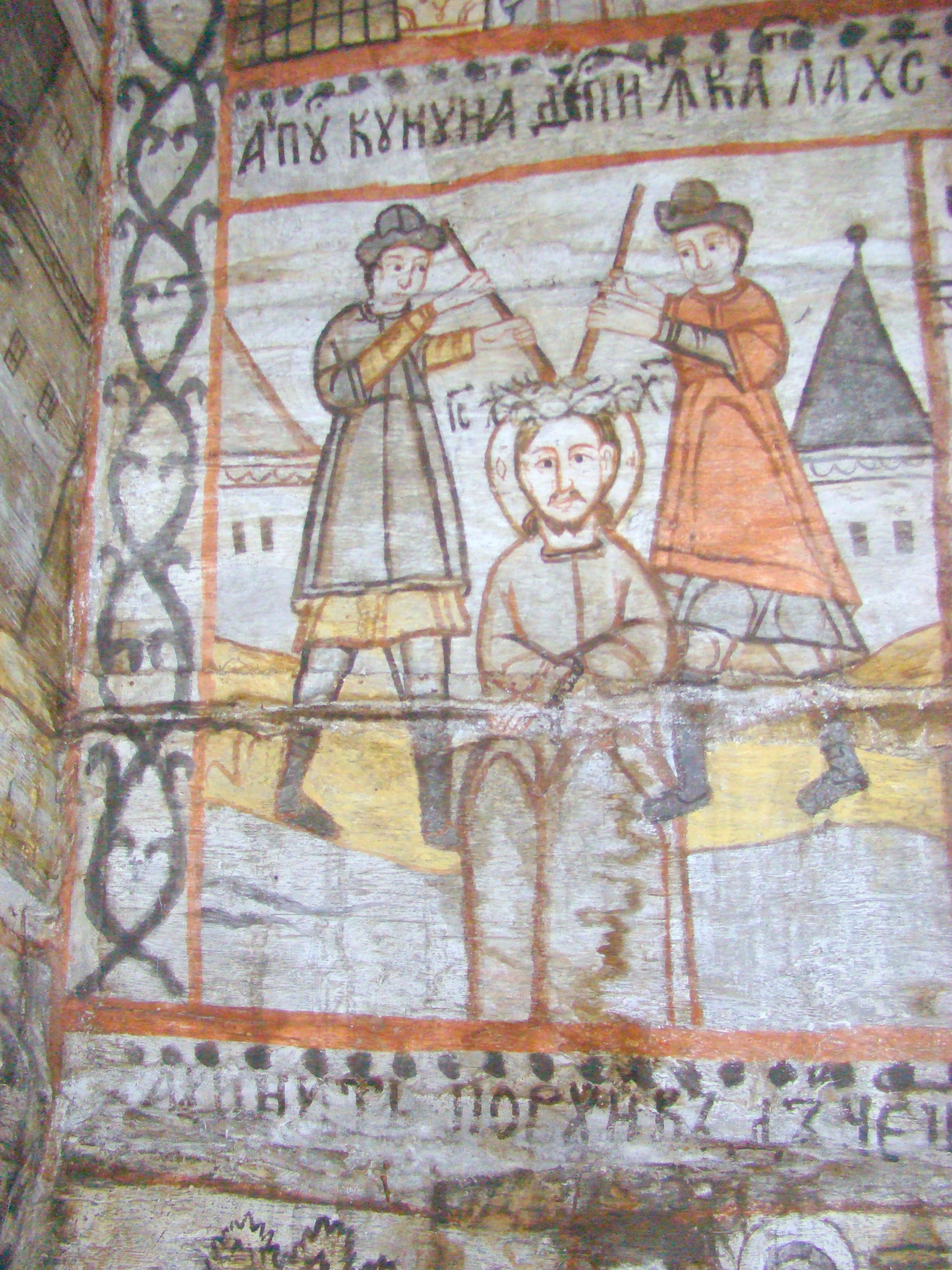 Biserica de lemn „Nașterea Maicii Domnului” din Călinești-Căeni, județul Maramureș